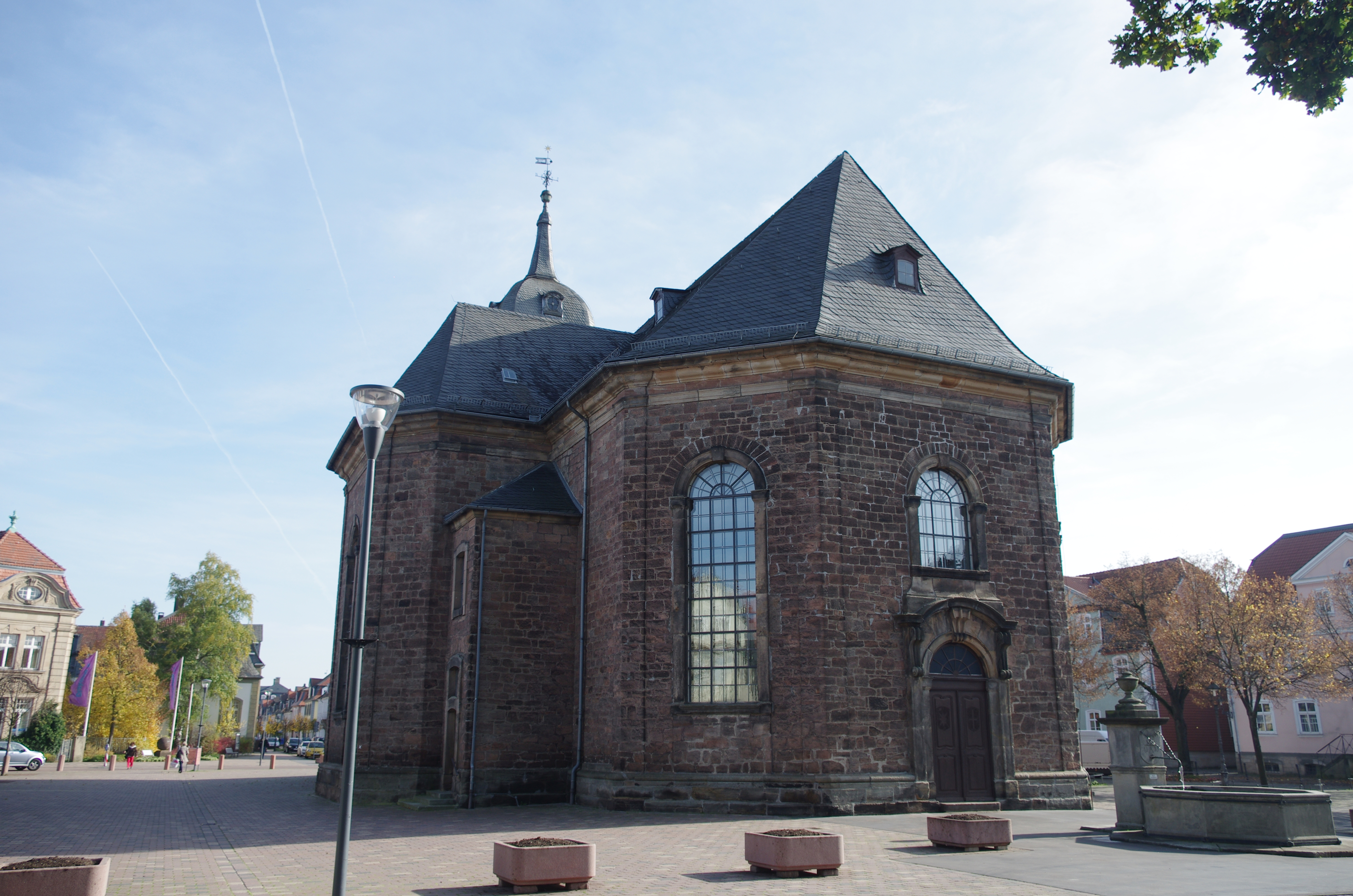 Bad Arolsen in Hessen. Die Stadtkirche befindet sich in der Mitte der 'Stadt.